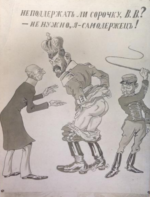 Открытка "Не поддержать ли сорочку?" – [Б.м.], [Б.г.].